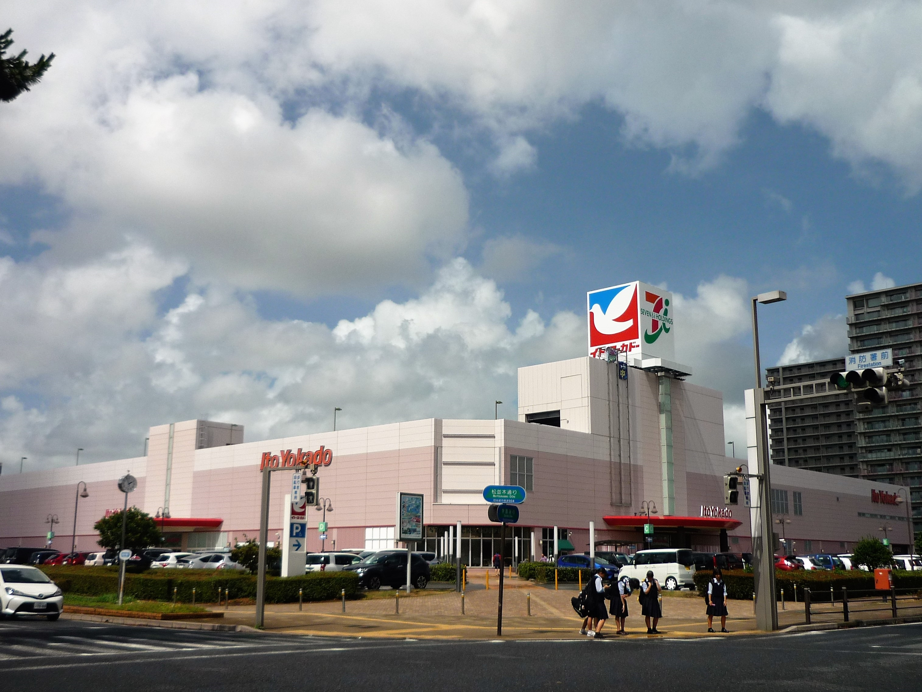 イトーヨーカドー四街道店 Panasonic Lumix DMC-FS3